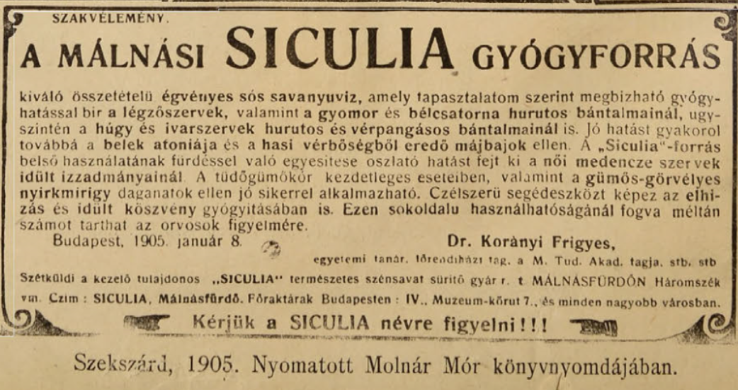 Tolnavármegye Hetilapja 1905